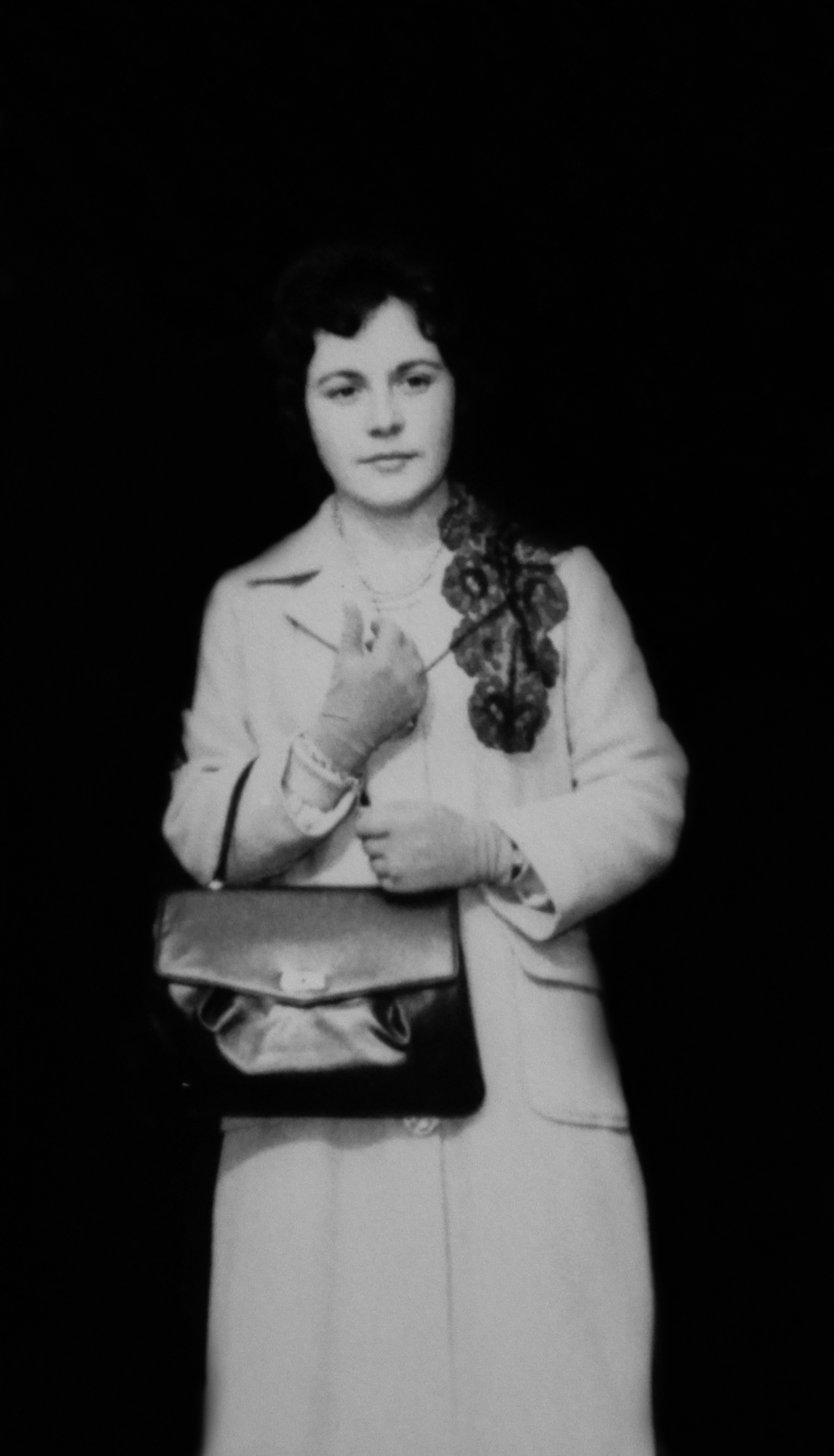 Vera Hernaez, berak diseinatutako jantziarekin.